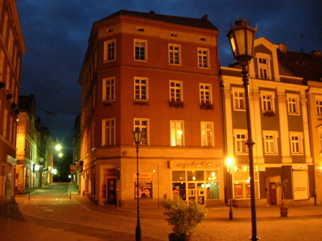 Wałbrzych - fragment Starego Miasta nocą.